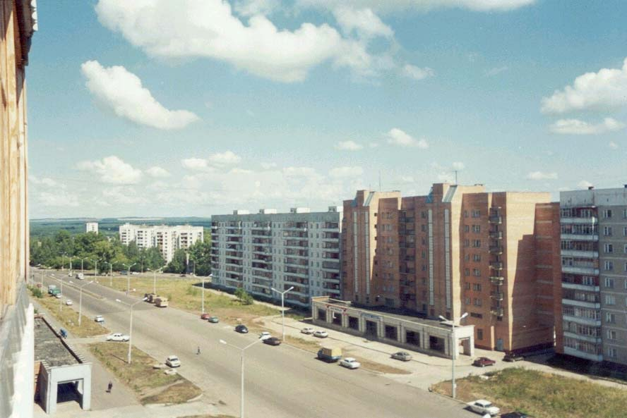 Проспект России (Кирово-Чепецк)